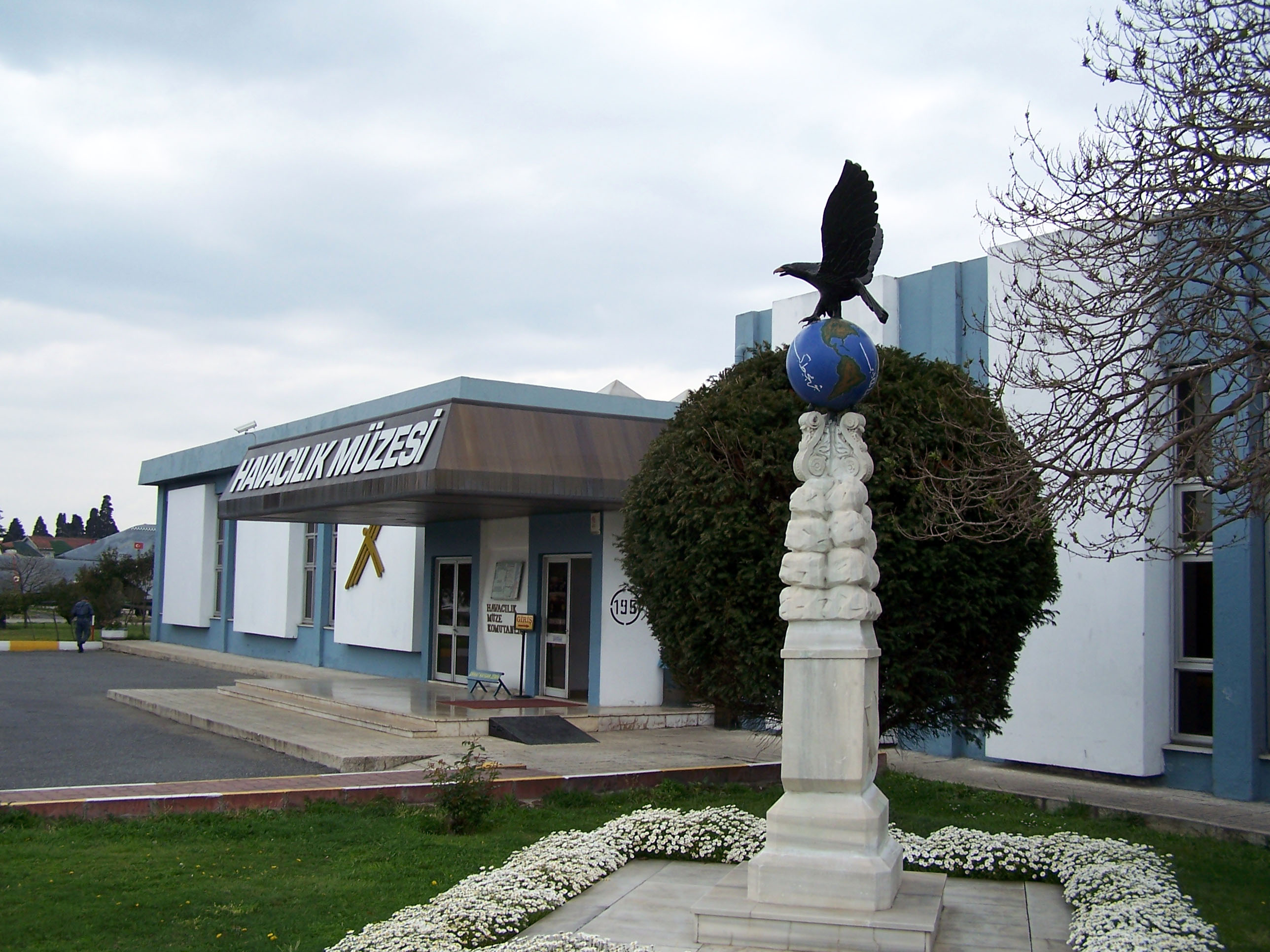 Istanbul Aviation Museum (İstanbul Havacılık Müzesi)